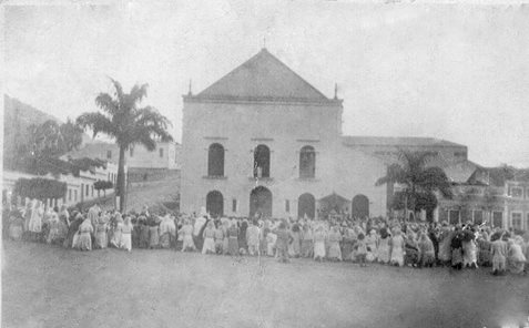 Município do Brejo da Madre de Deus, Pernambuco.